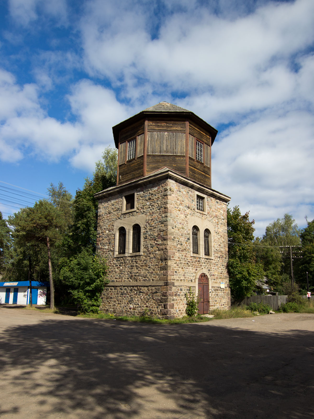 Главная достопримечательность Пестова - водонапорная башня возле железнодорожной станции